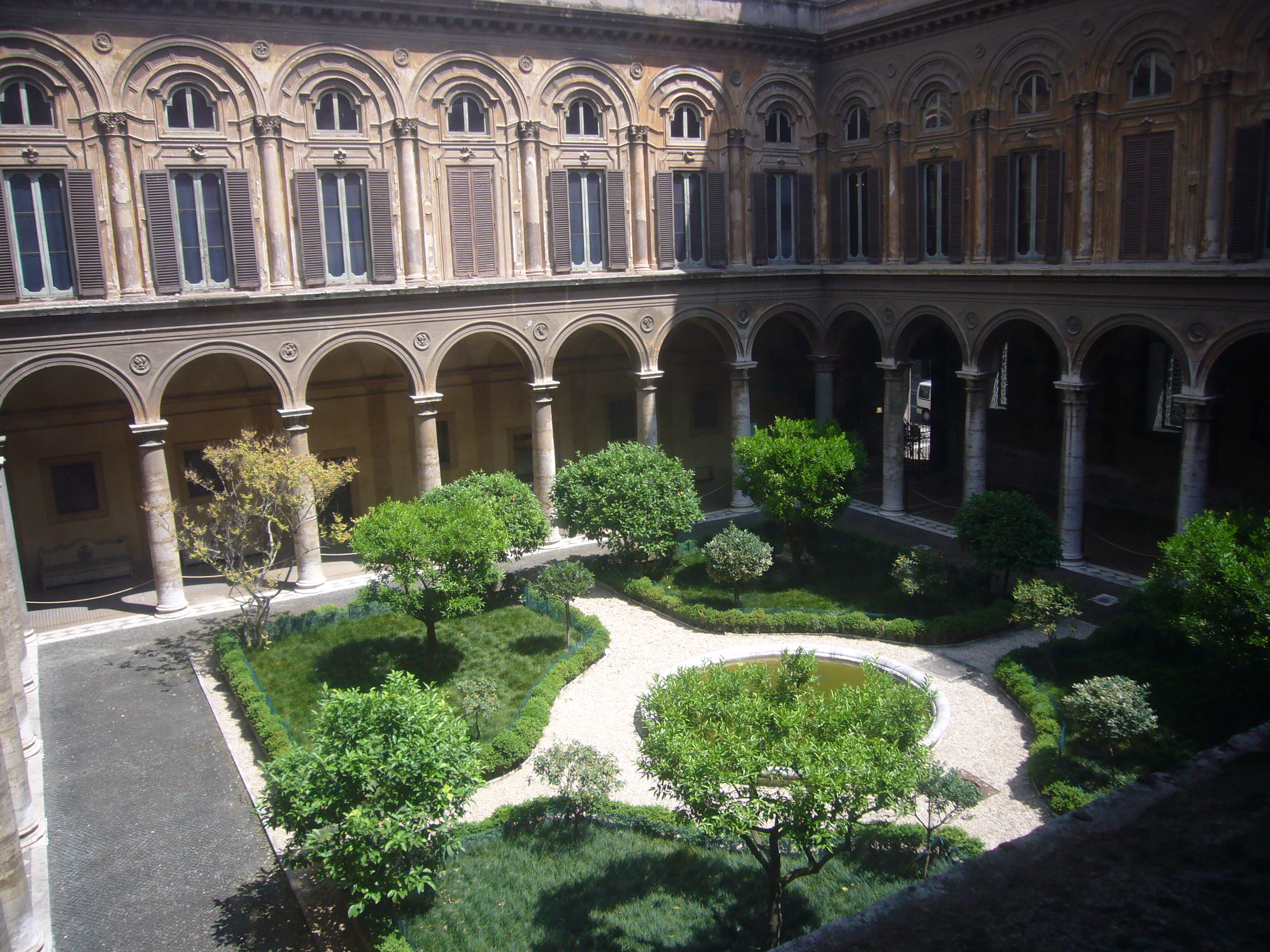 Roma, Palazzo Doria Pamphili: cortile